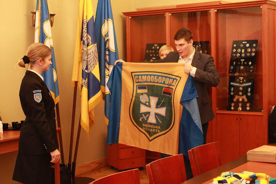 Sten H. Vihmar